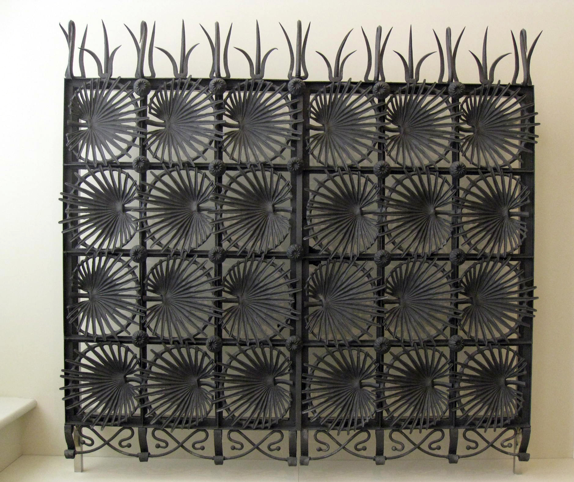 Palau Nacional (Barcelona)